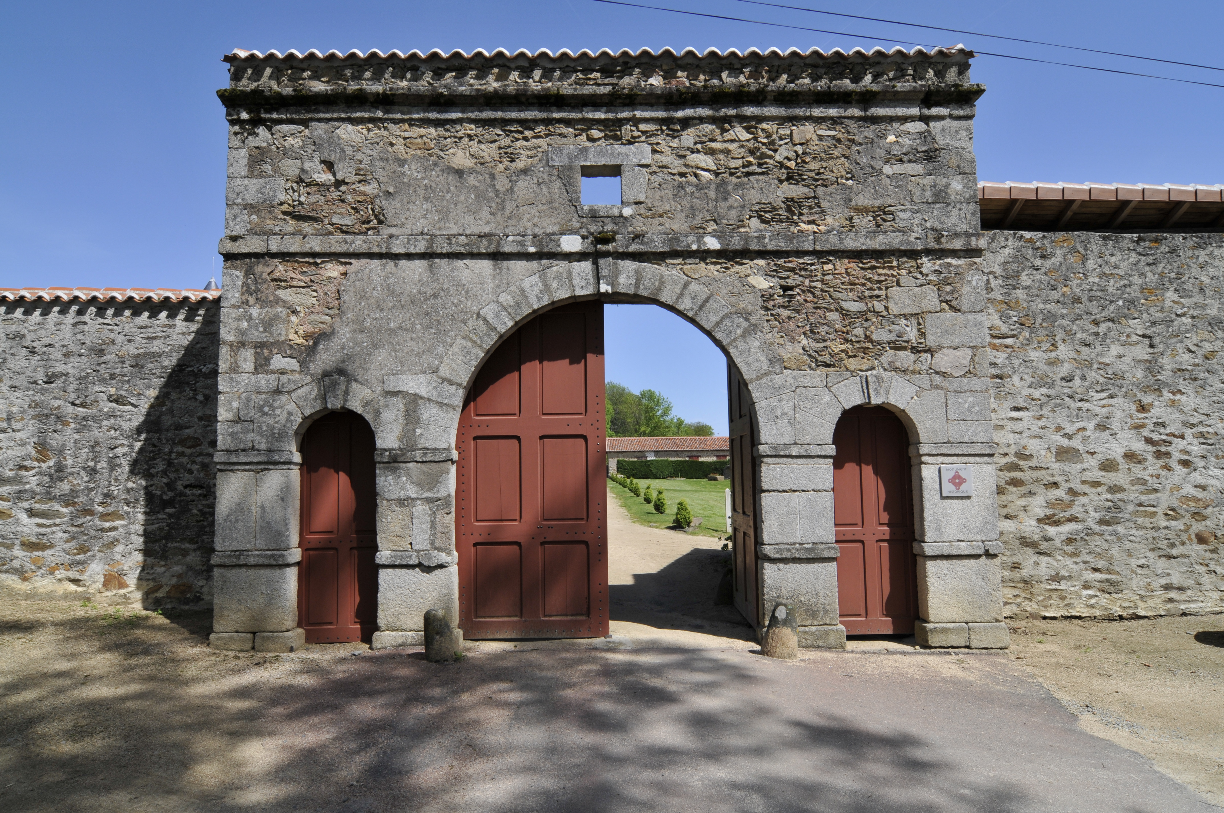 Porte du Château de Rochebrune (16)